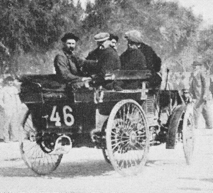 Berlet (souvent confondu avec le constructeur Berliet!) au départ de Marseille sur Peugeot (Paris-Marseille-Paris 1896, casino de la Plage (Le Sport universel illustré du 15 octobre 1896, p.336)